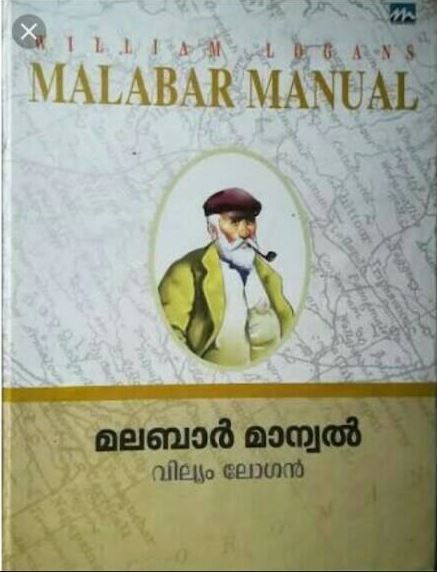 വില്ല്യം, ലോഗൻ (2012 (ഒമ്പതാം പതിപ്പ്)). മലബാർ മാന്വൽ. മാതൃഭൂമി പബ്ലിഷേഴ്സ്.